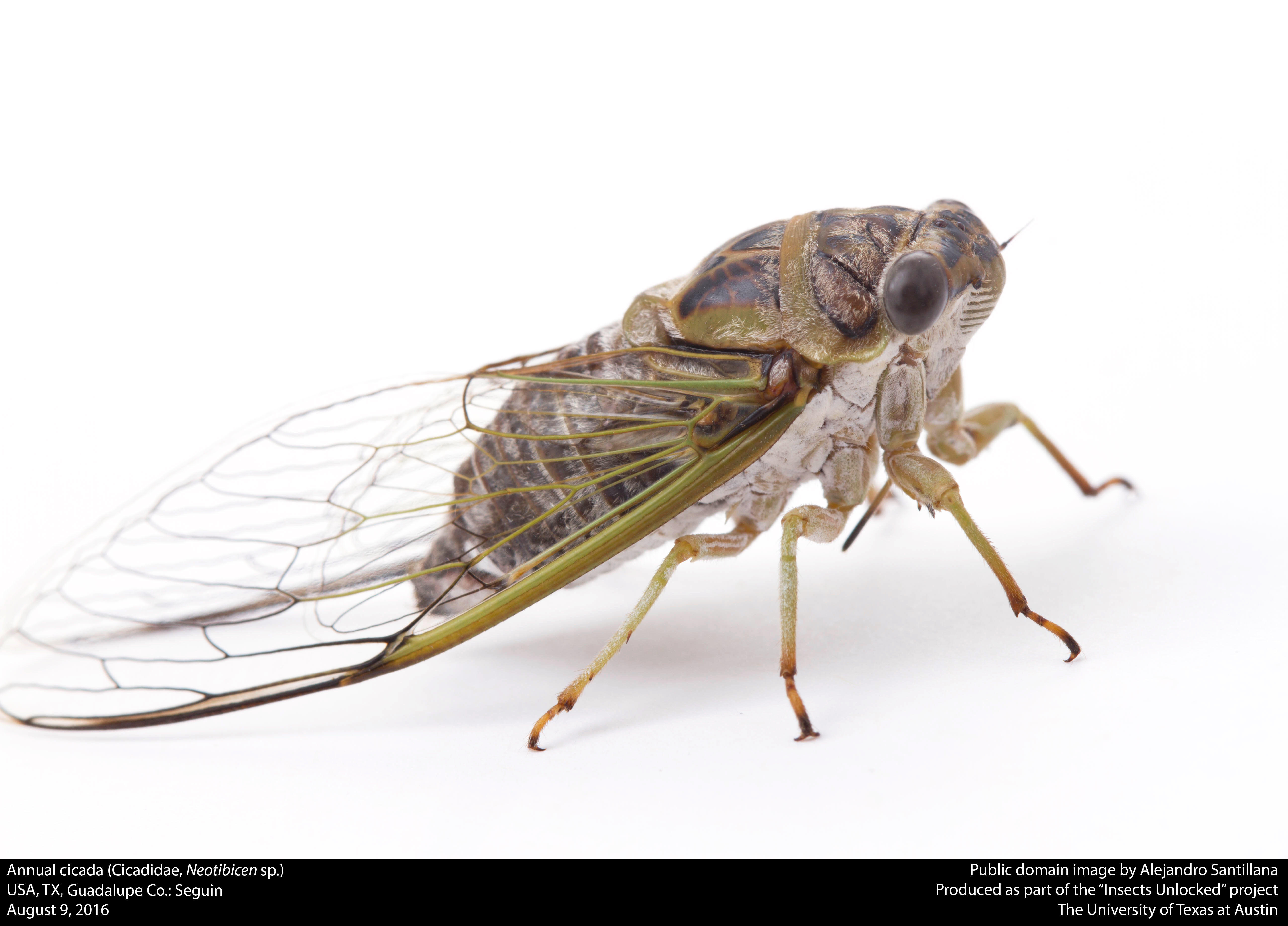 USA, TX, Guadalupe Co.: Seguin 9-viii-2016